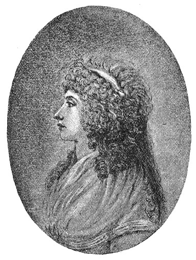 Självporträtt av Charlotte von Stein (1790), född 25 december 1742, död 1827. Goethes flickvän.